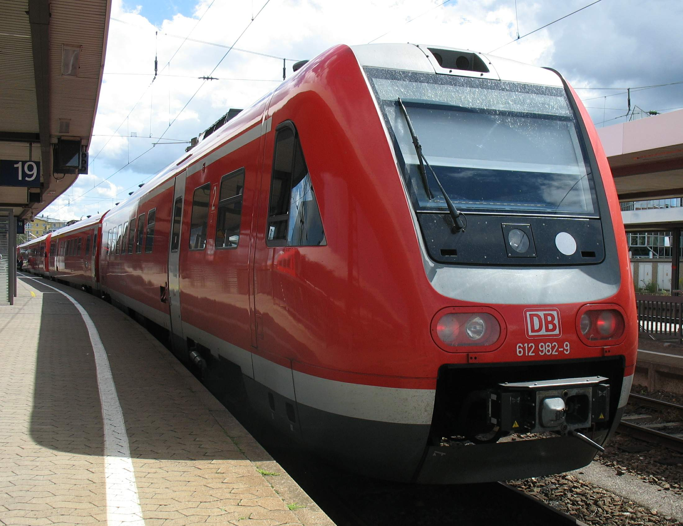 Pendolino DB BR 612 a Norimberga il 13/8/08